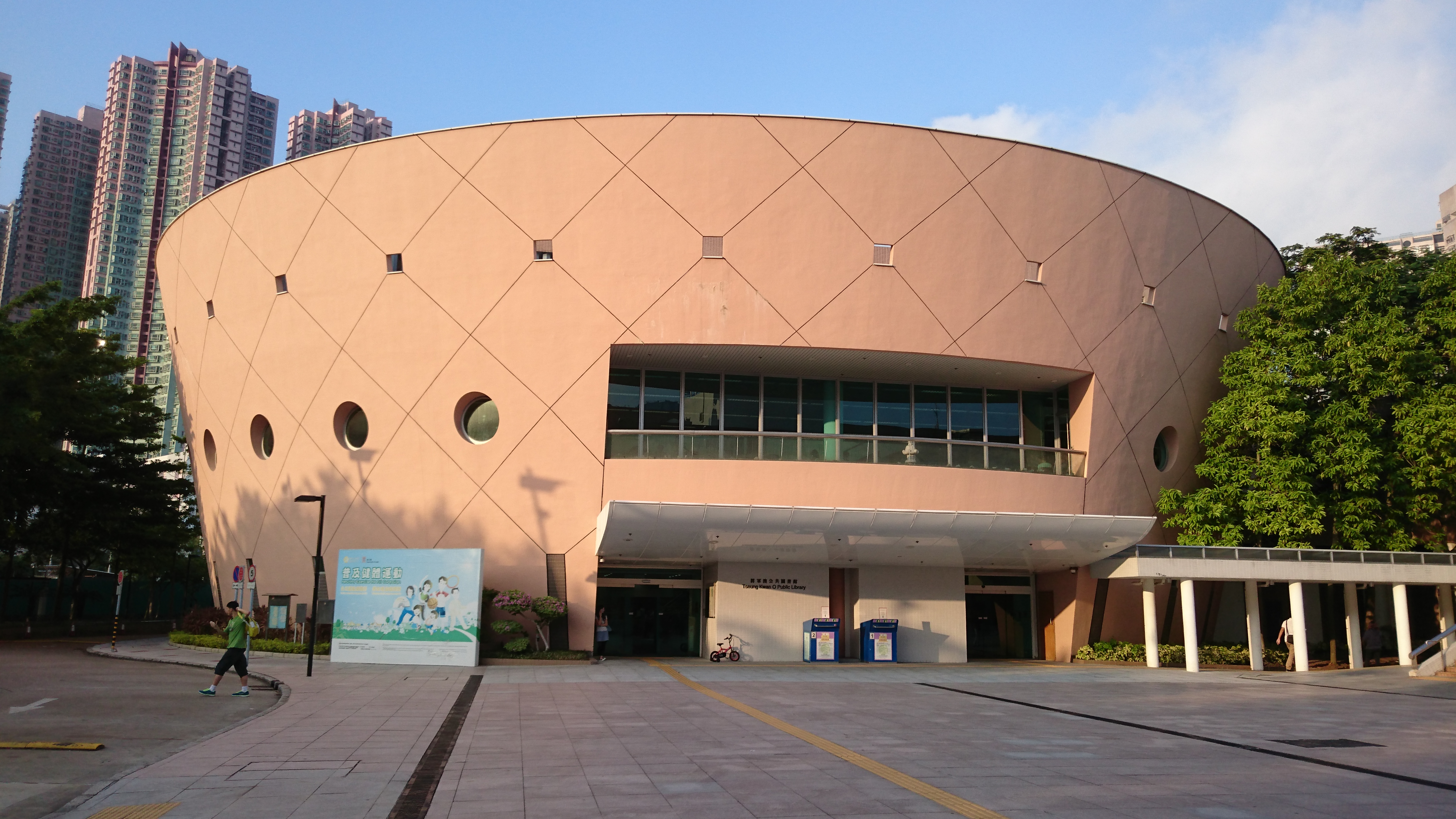 Yau Yue Wan, Hong Kong